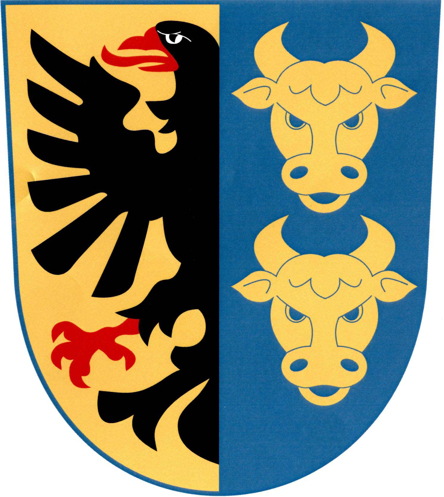 Znak obce Tuř